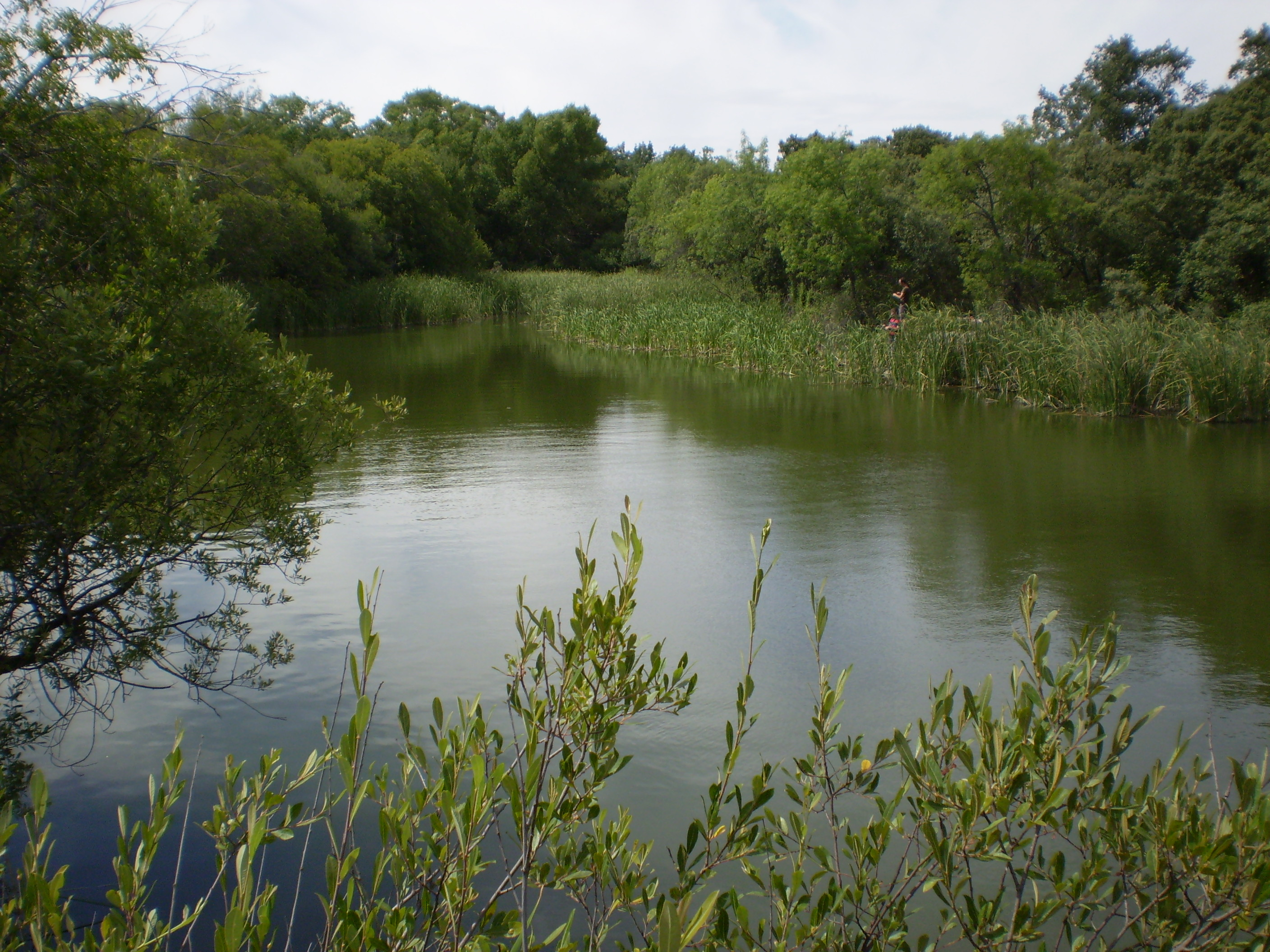 Arroyo Ladrón (afluente del río Aulencia), retenido en el embalse de Los Arroyos. Término municipal de El Escorial, Madrid, Spain